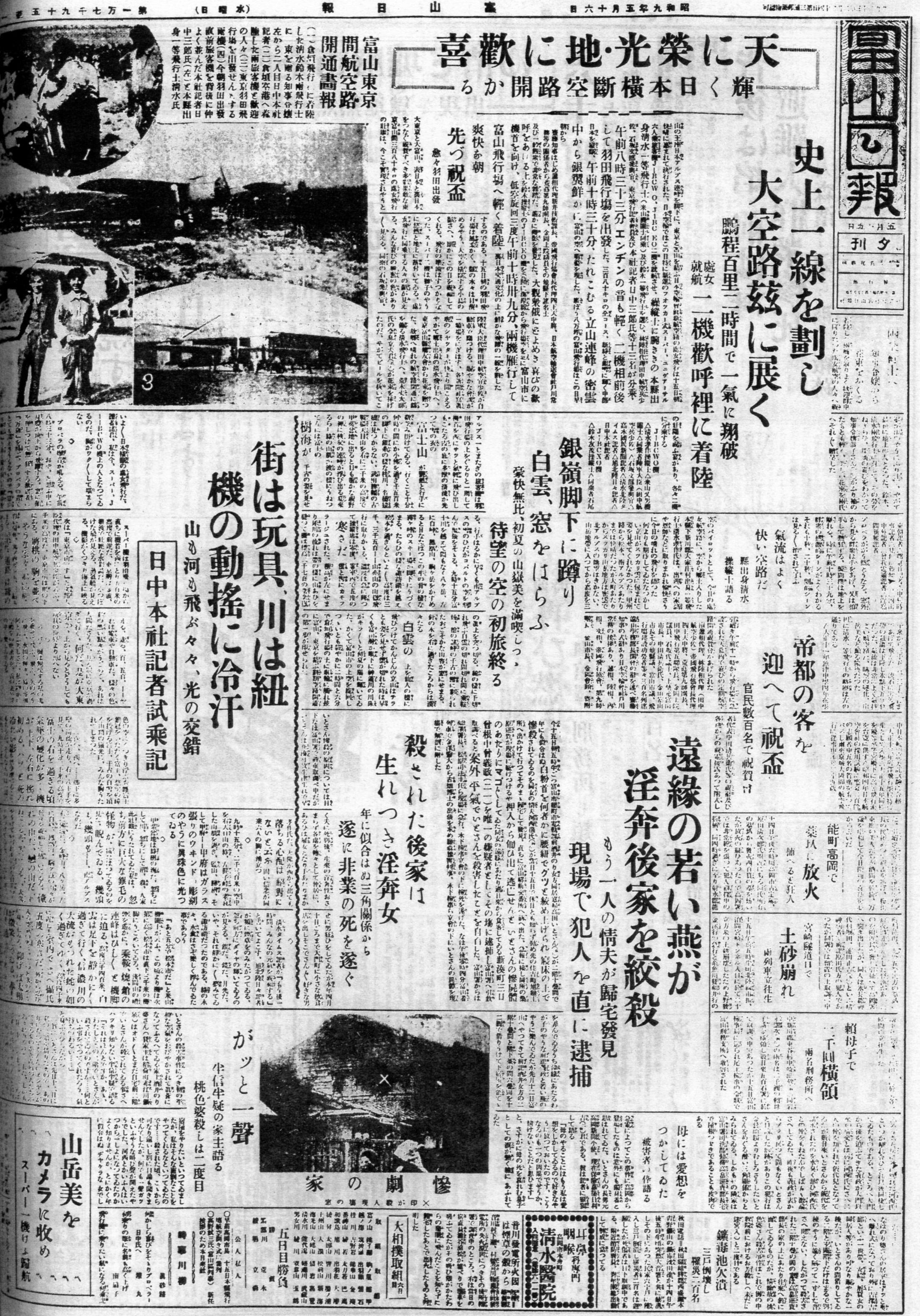 富山 - 東京間航空定期便就航を報ずる新聞